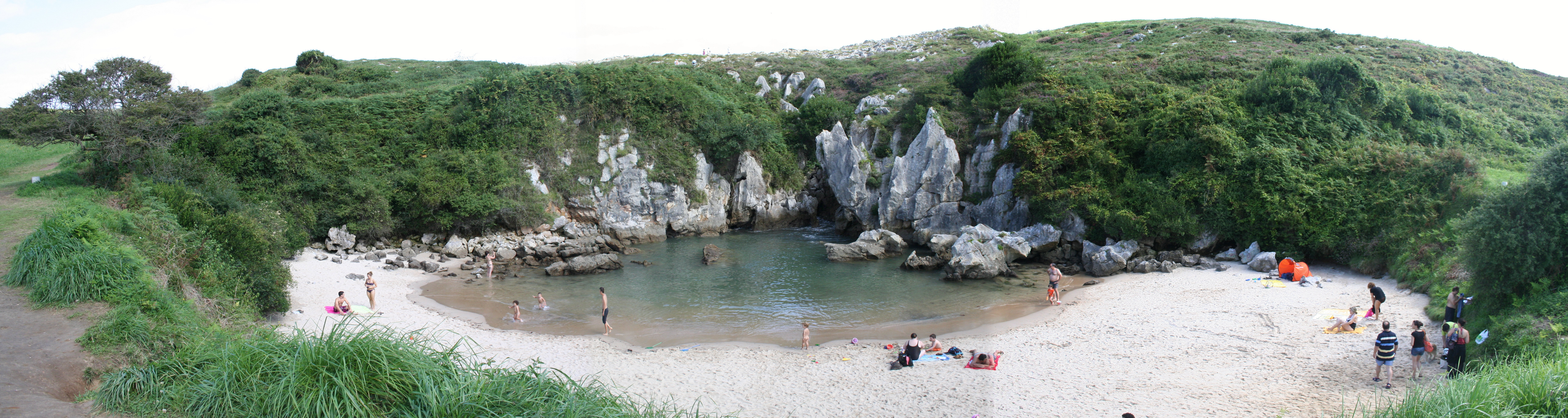 Una panoramica della spiaggia di Gulpiyuri